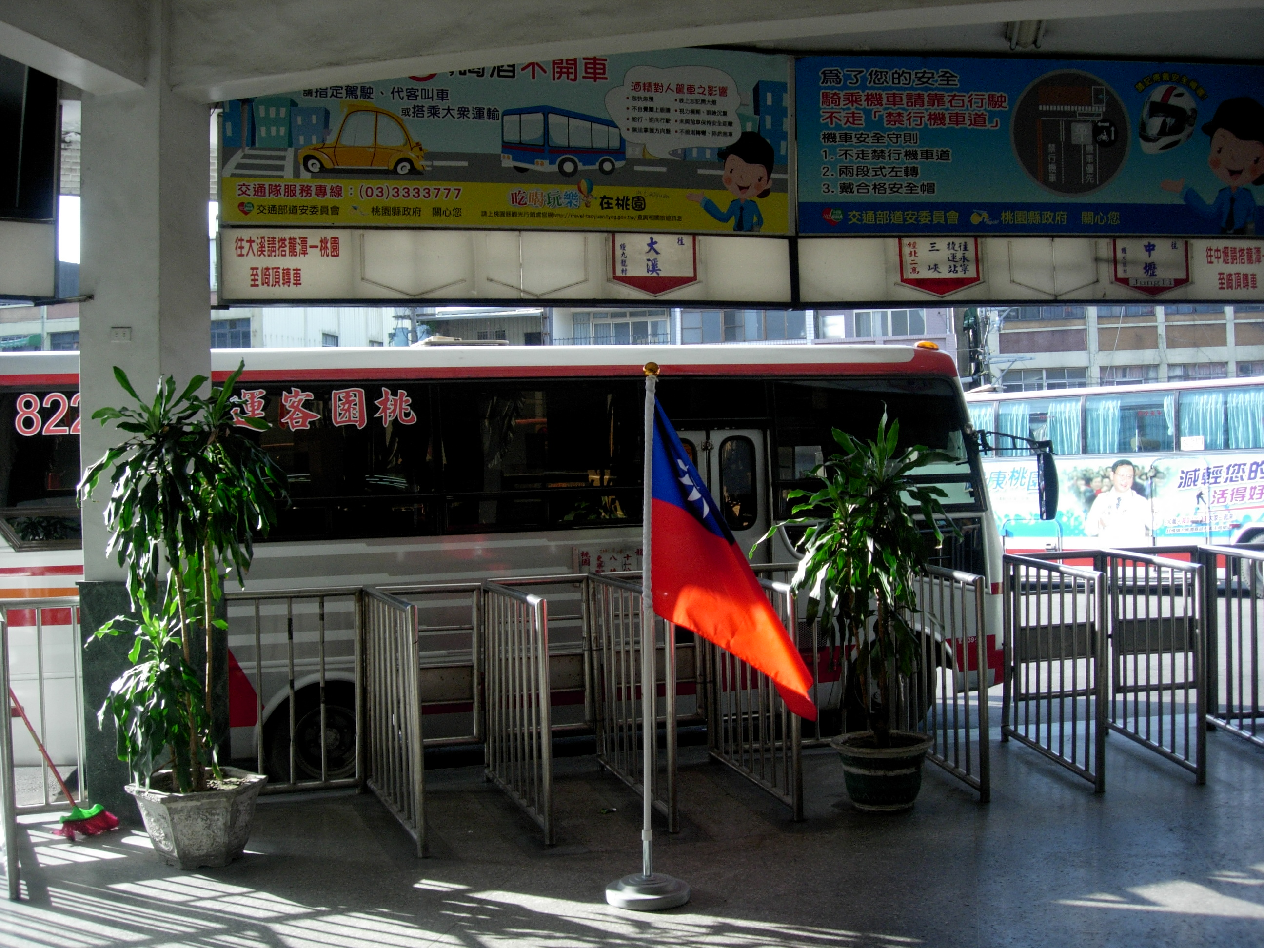 中文（台灣）: 桃園客運龍潭站月台